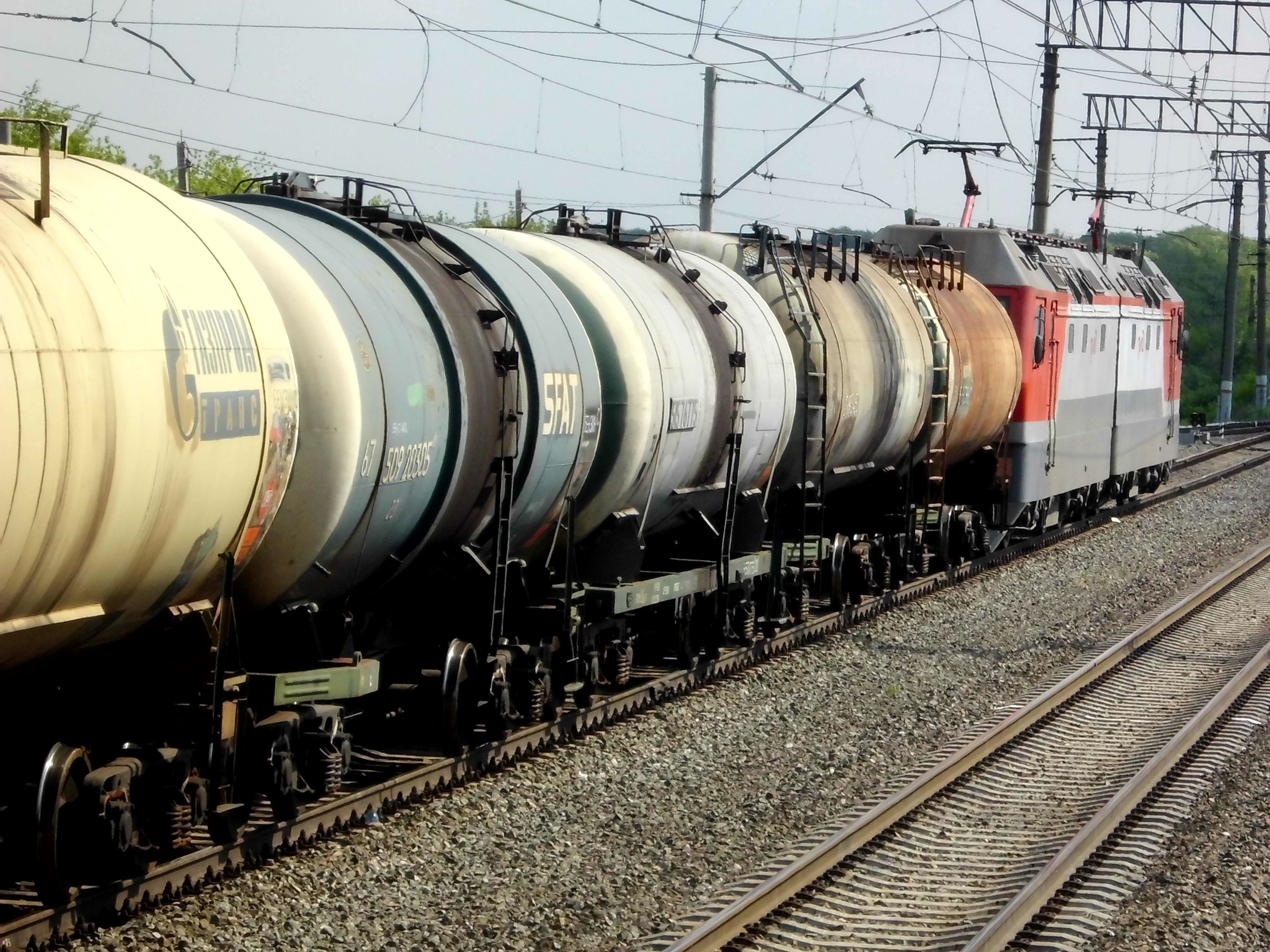 Поезд из 4-х осных вагонов-цистерн для нефти и светлых нефтепродуктов (бензин, керосин, дизельное топливо и т.д.) и локомотива 2ЭС6. Станция Межозёрная. Россия.